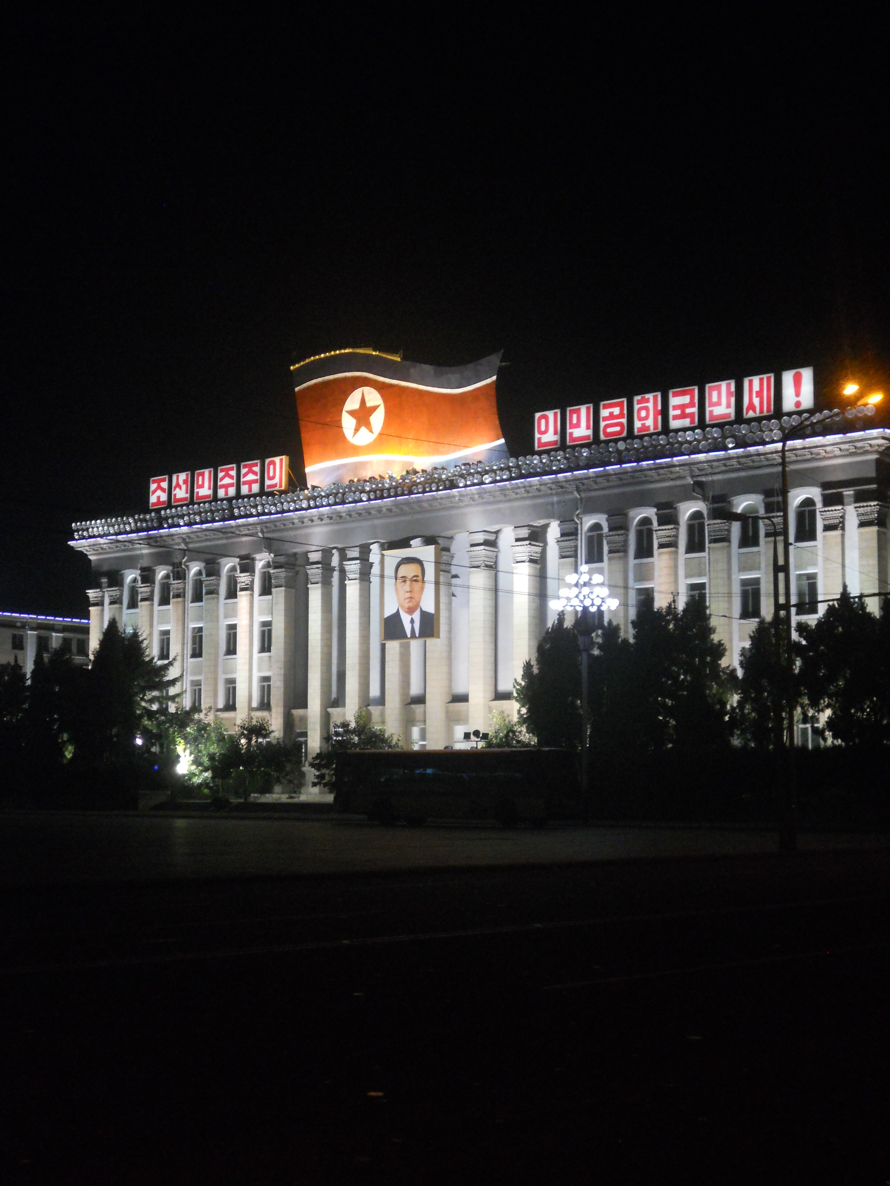 Kim Il Sung Square